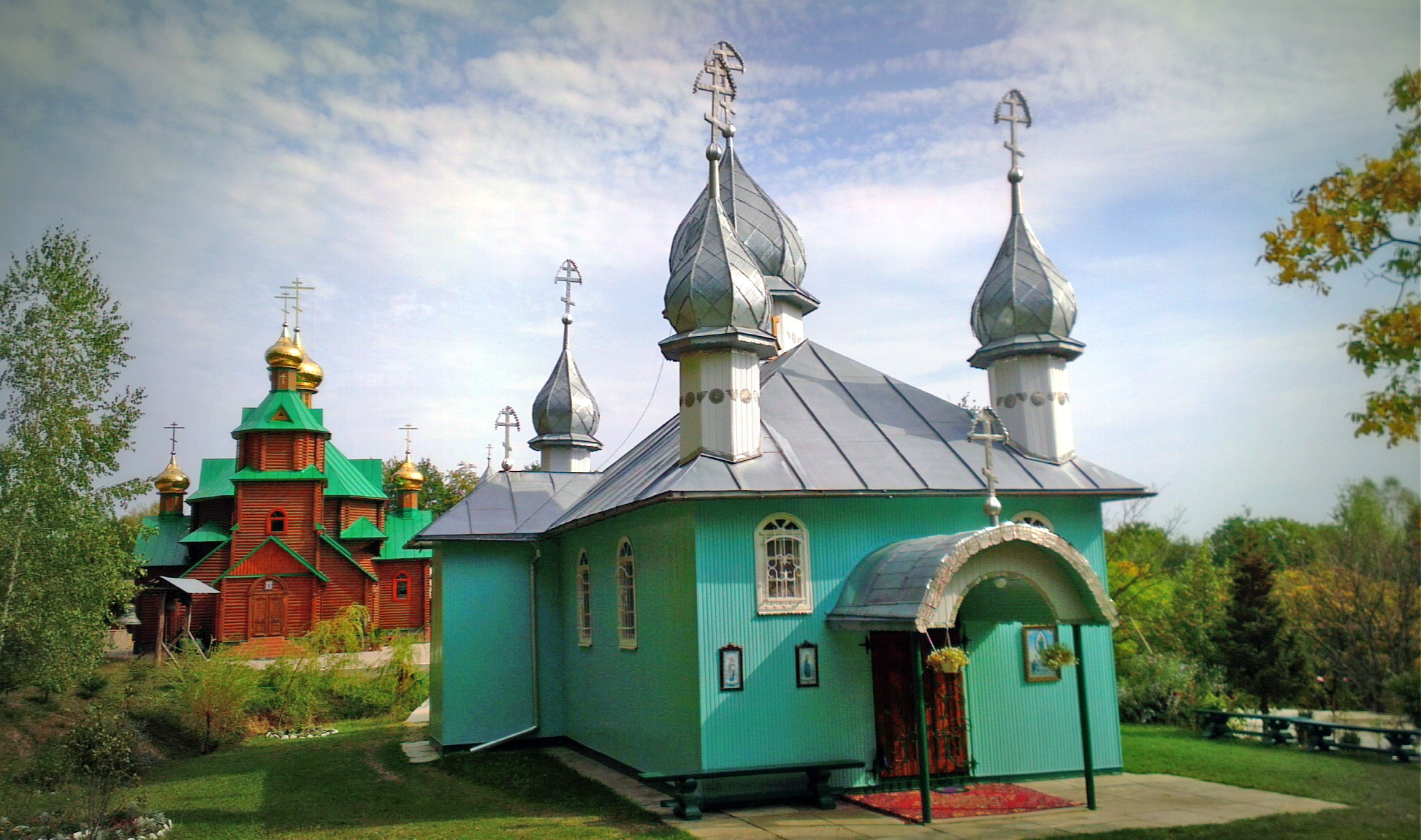 Свято-Сергиева пустынь (Грушево, Закарпатье)